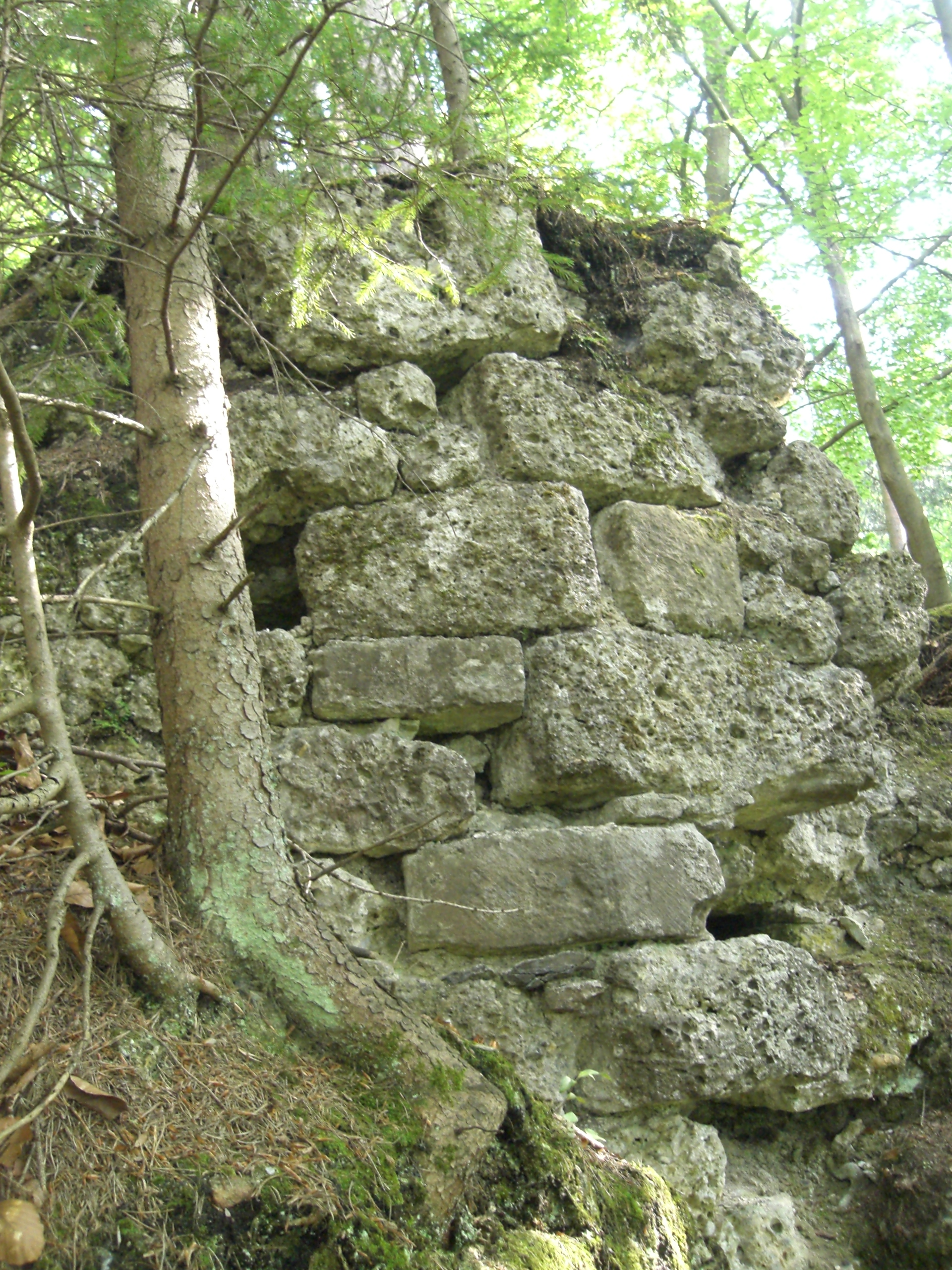 Außenwand an der Nordostecke der Ruine Greifenfels